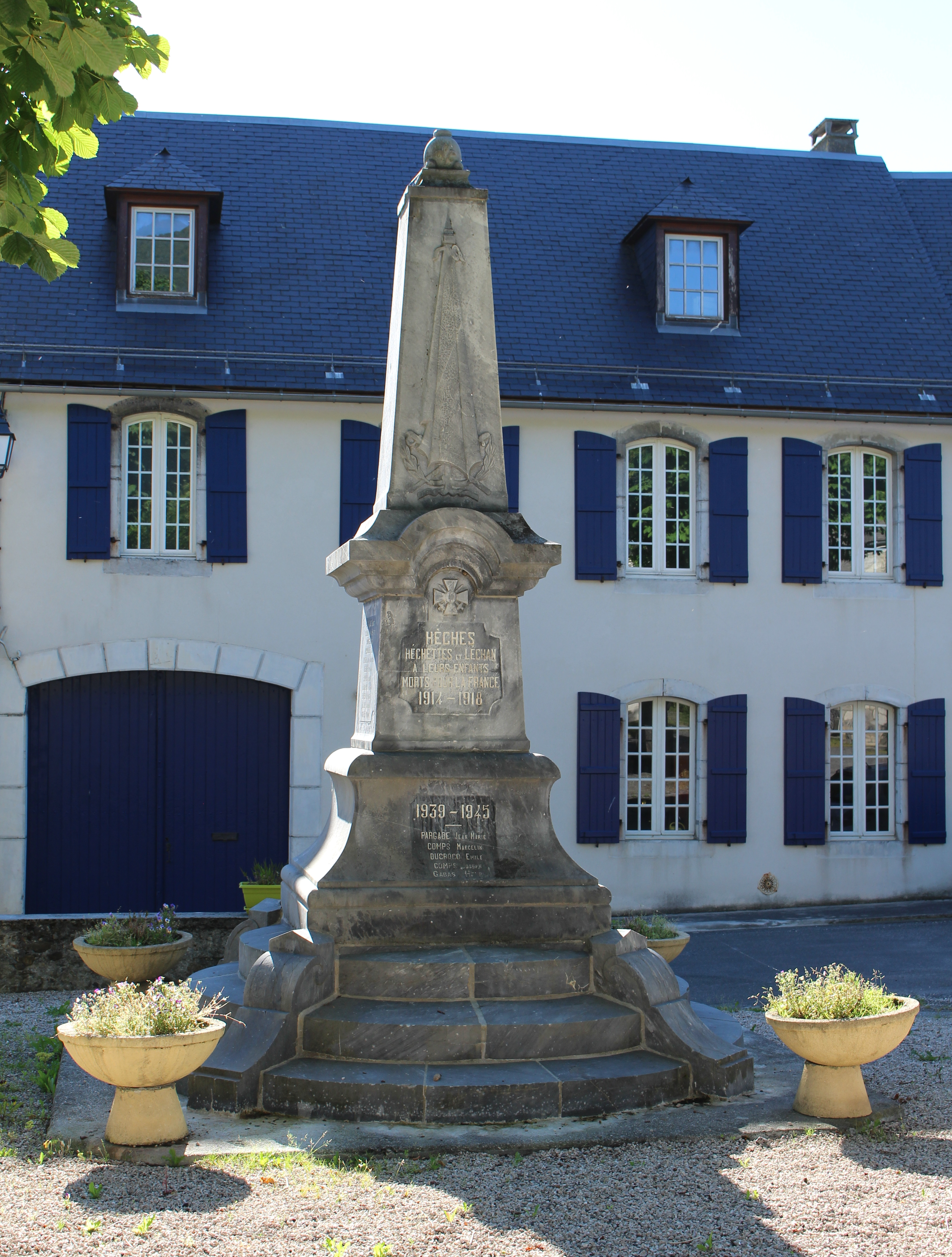 Monument aux morts de Hèches (Hautes-Pyrénées)